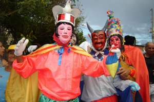 Fiestas Dicembrinas de Nuestro pueblo